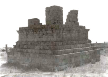 From fr.Wikipedia (Tombeau_massinissa.jpg) (suppr) (actu) 16 mars 2005 à 13:20 . . Mokraoui . . 411x339 (37961 octets) (Tombeau de Massinissa (Constantine)) Slightly computer graphic aid by Horatius. (409x293 pixel), 150 px/inch